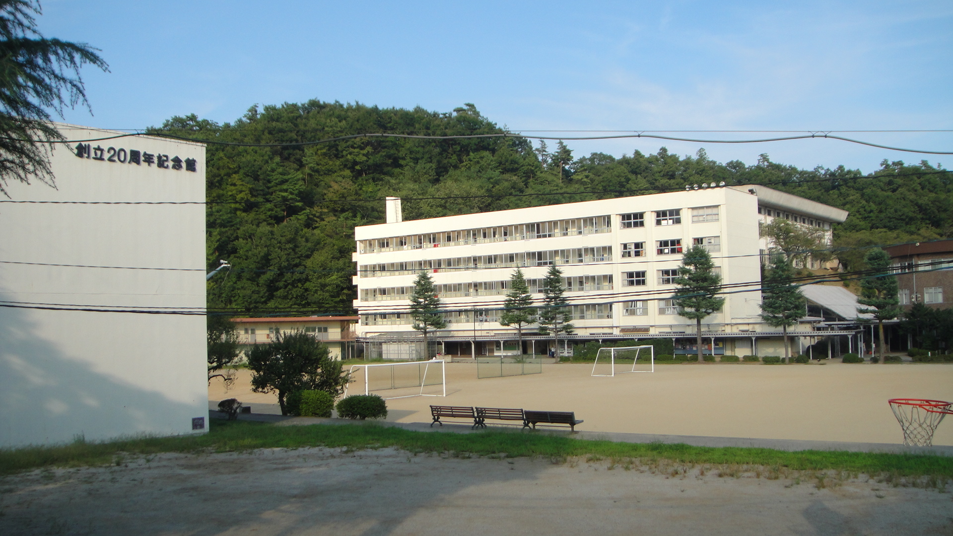 日大明誠 山梨県上野原市